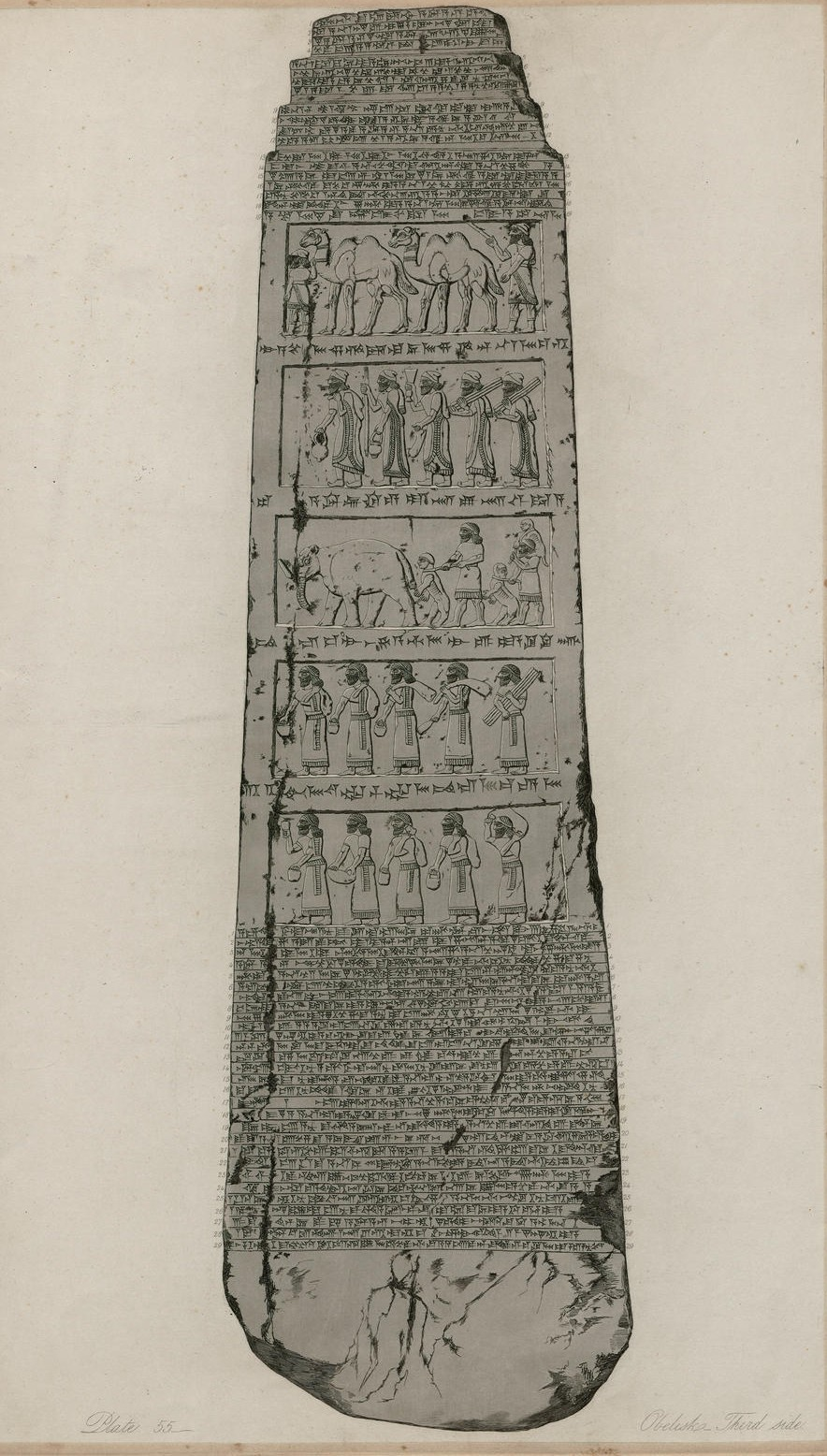 Der Obelisk aus Nimrud gefunden von Layard